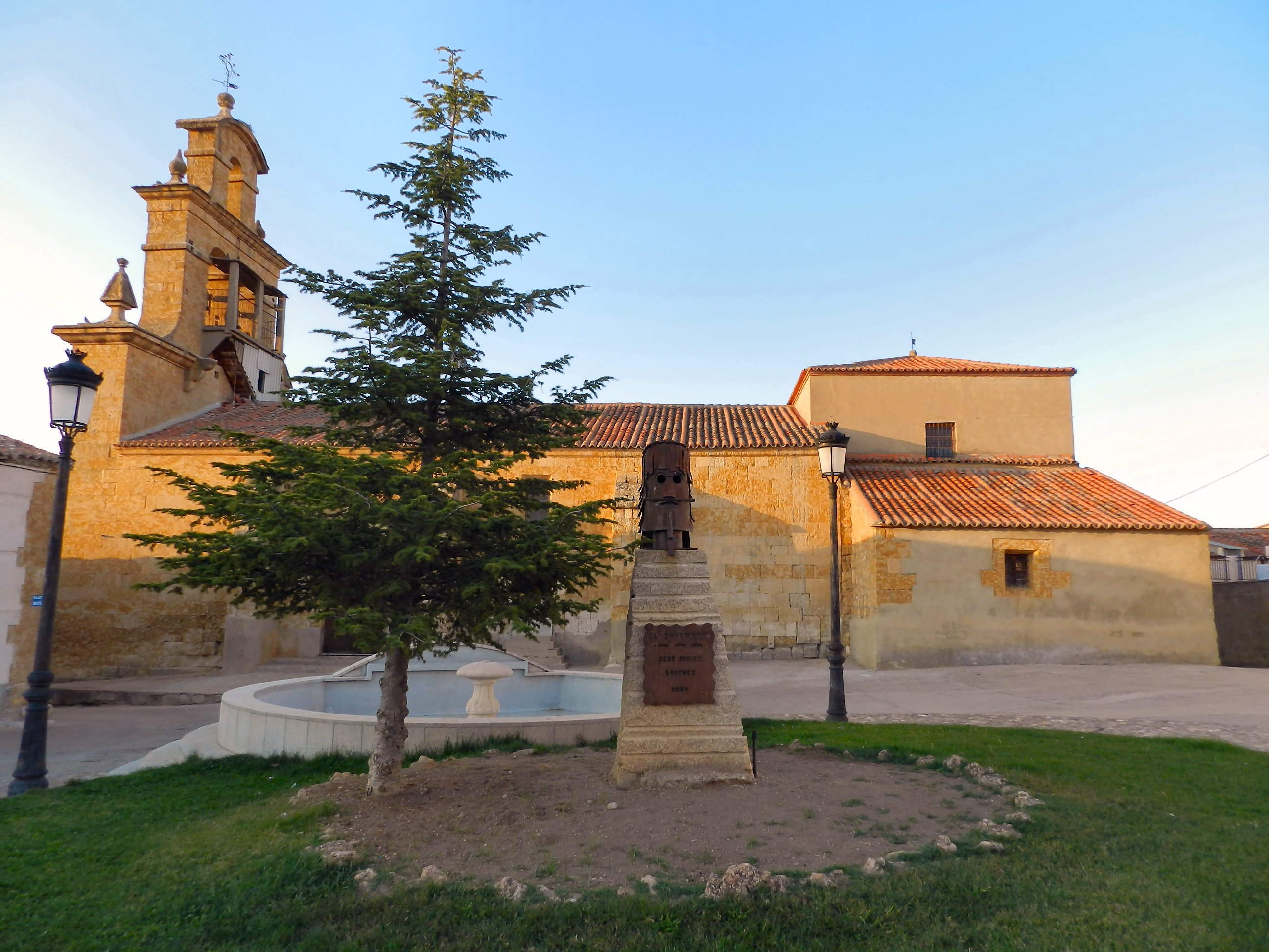 Sanzoles